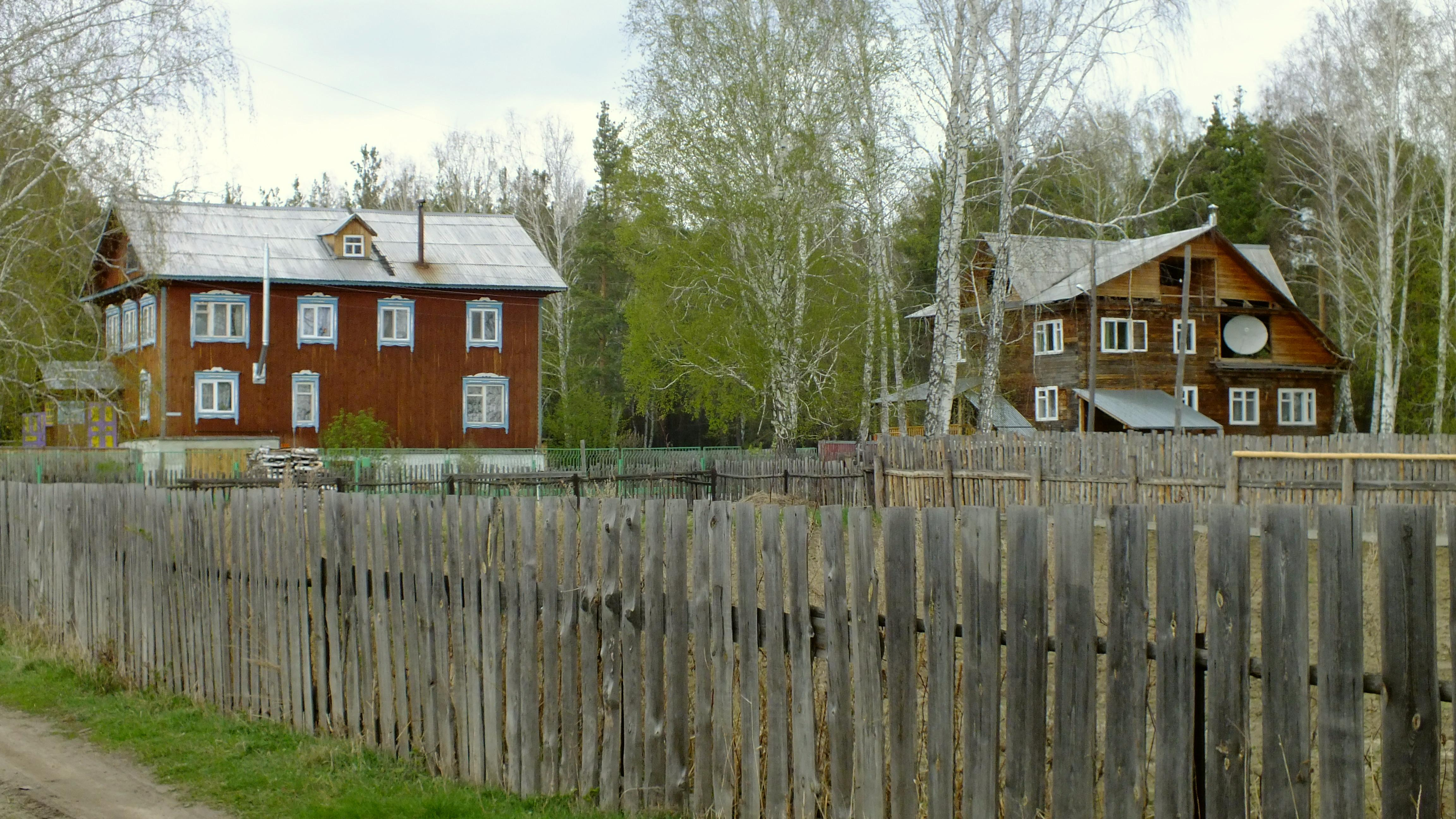 Вид на улицу Кооперативную